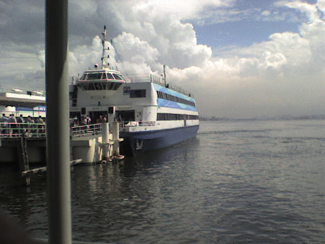 Estação das bracas de Niterói, Rio de janeiro - Brasil. Baía de Guanabara